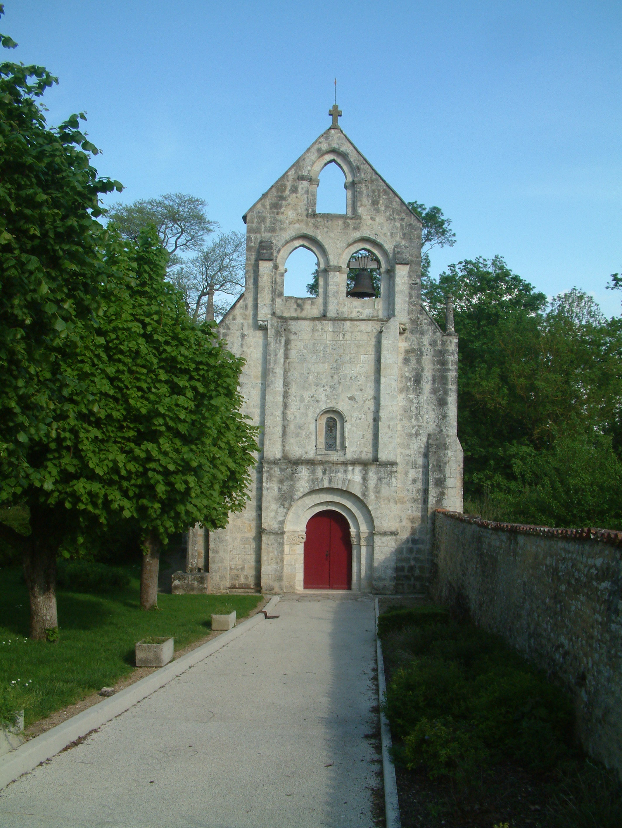 Eglise de St Coutant le Grand